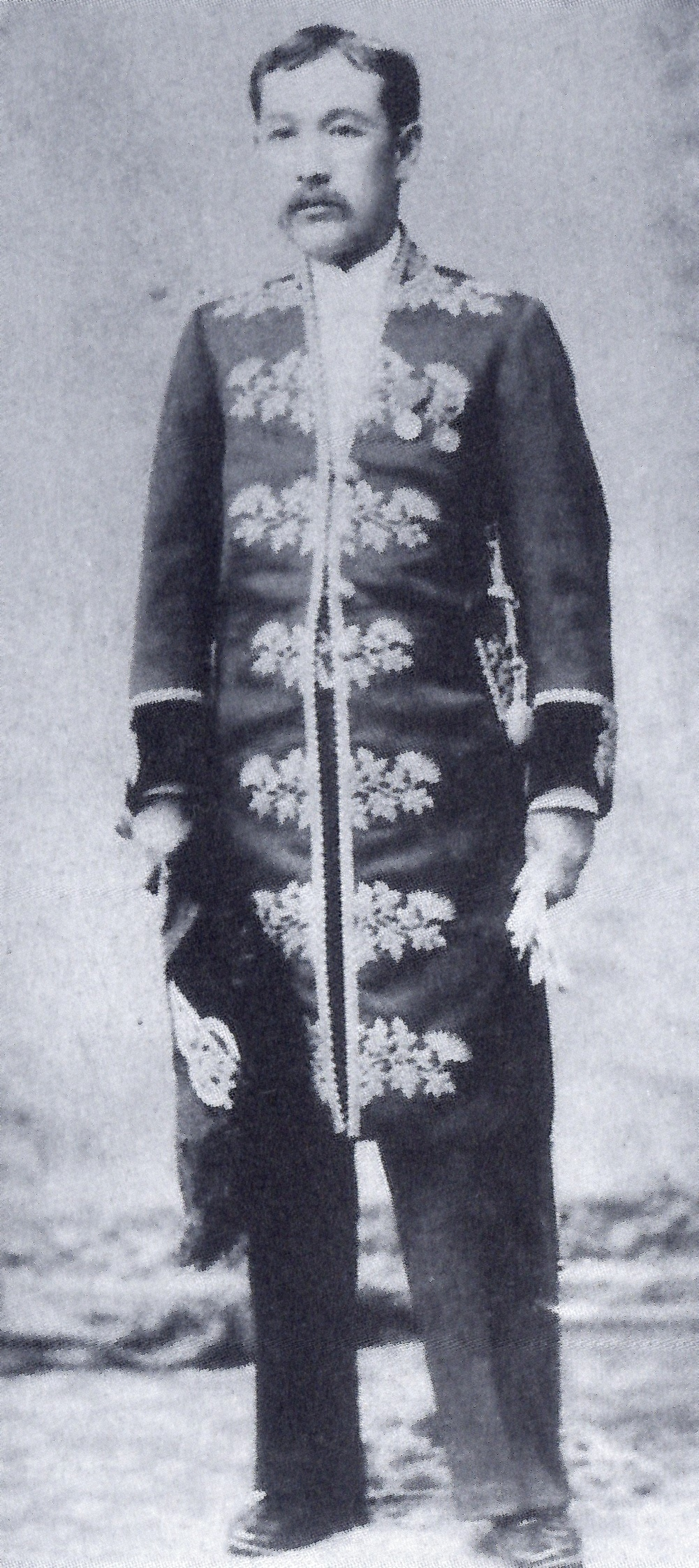 戸田光則の肖像。